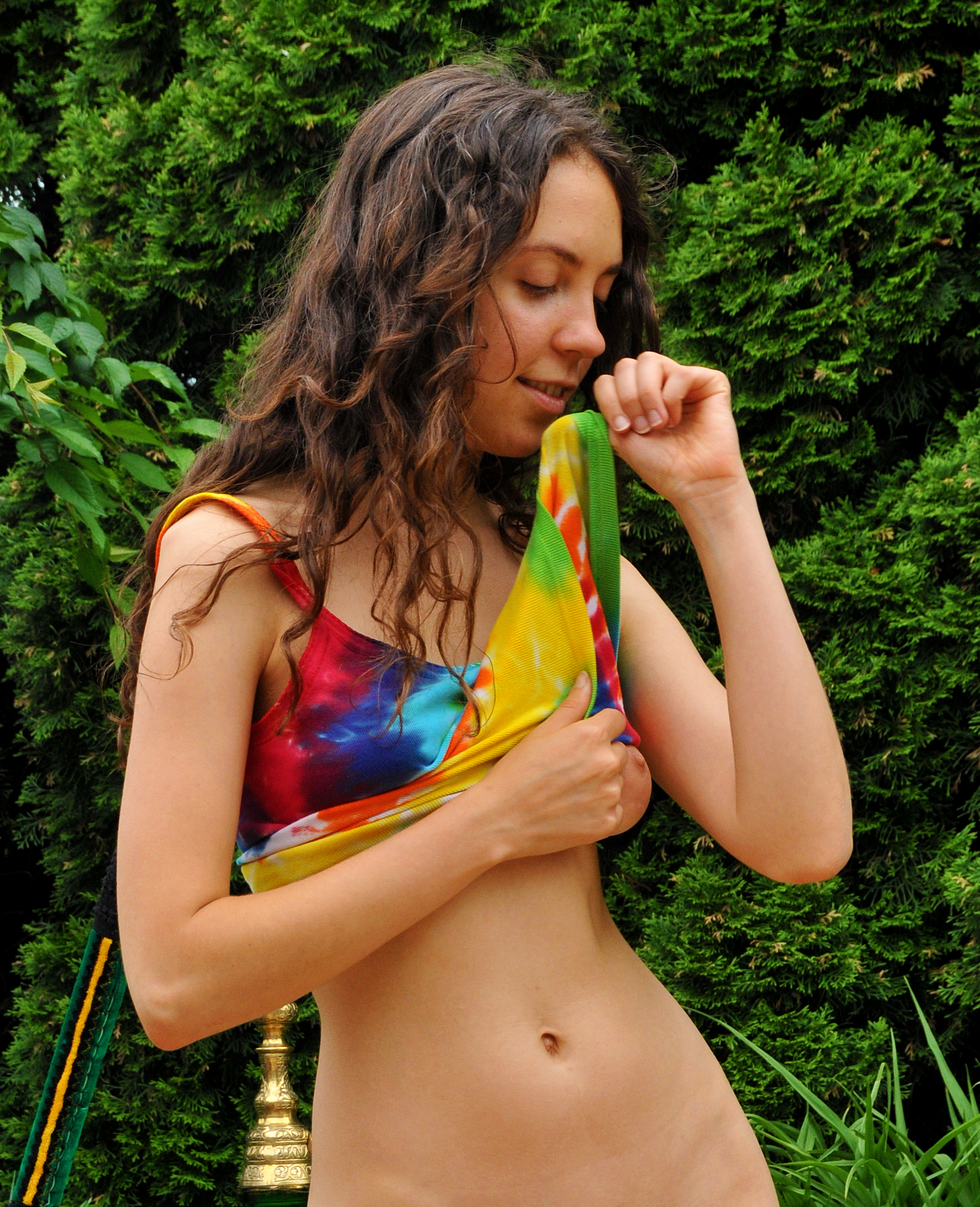 Wisdom